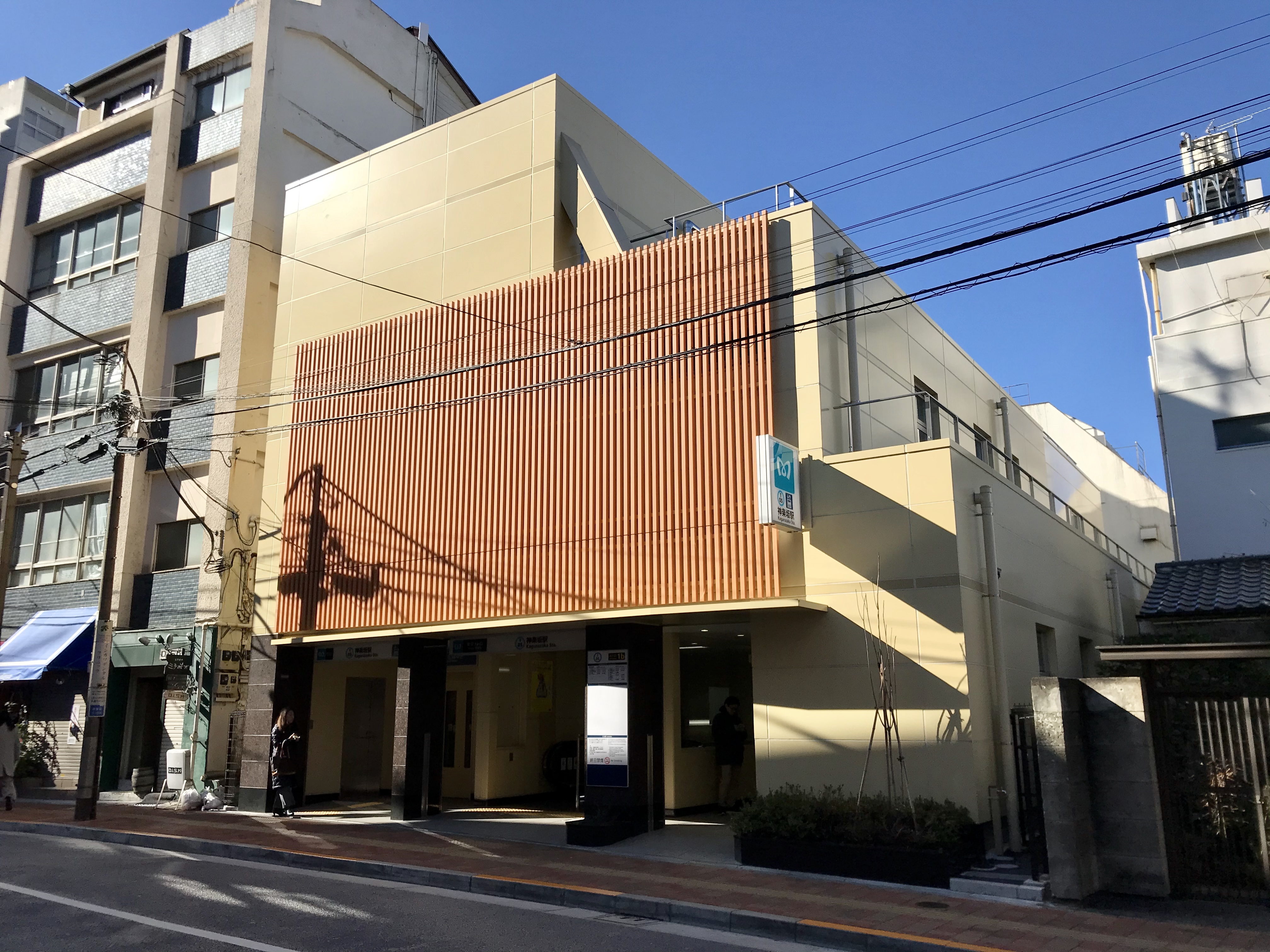 東京メトロ東西線神楽坂駅1b番出入口